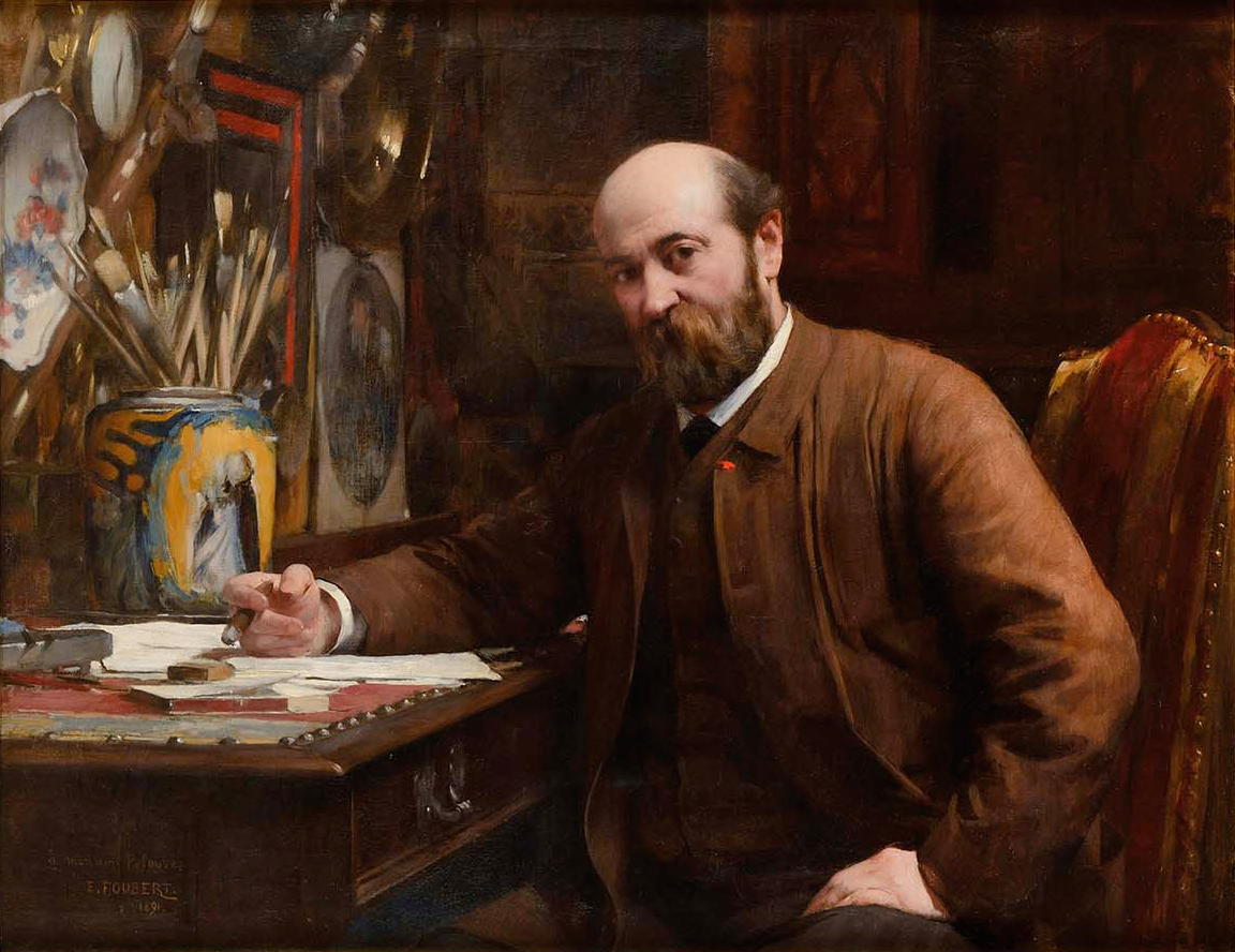 Léon Germain Pelouse dans son atelier